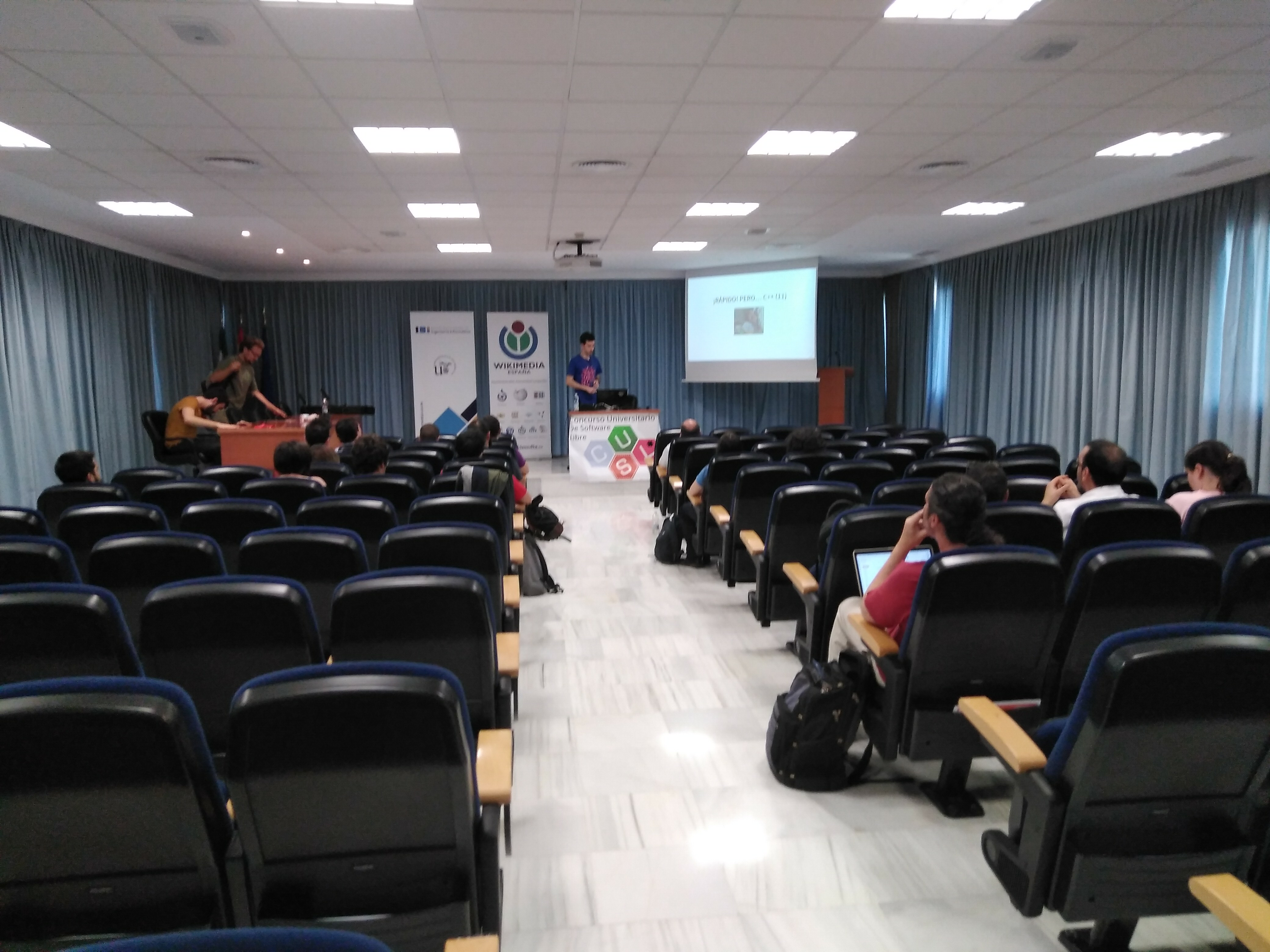 Presentación de Contribuciones a mlpack (Roberto Hueso) en la Fase Final del Concurso Universitario de Software Libre 2018. Salón de Grados de la Escuela Técnica Superior de Ingeniería Informática de la Universidad de Sevilla.